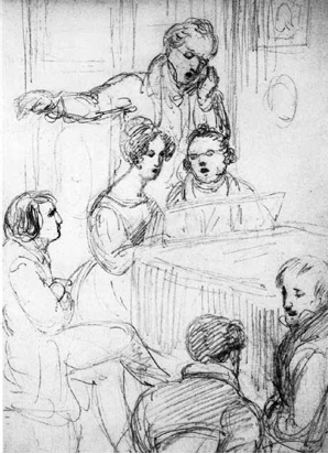 Ferdinand Georg Waldmüller. La soprano Josephine Fröhlich, el barítono Johann Michael Vogl y Franz Schubert cantan y tocan un «lied» a tres voces. Dibujo a lápiz, 1827. Biblioteca nacional Austriaca (Viena)